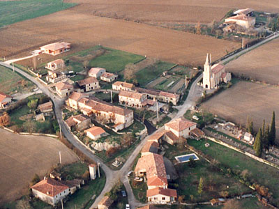 Village de Bouvées, commune rattachée à Labrihe le 1er janvier 1824 - Photo Alain Robert